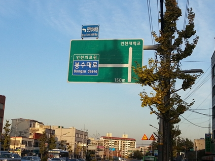 송림로 봉수대로 연결 표지판